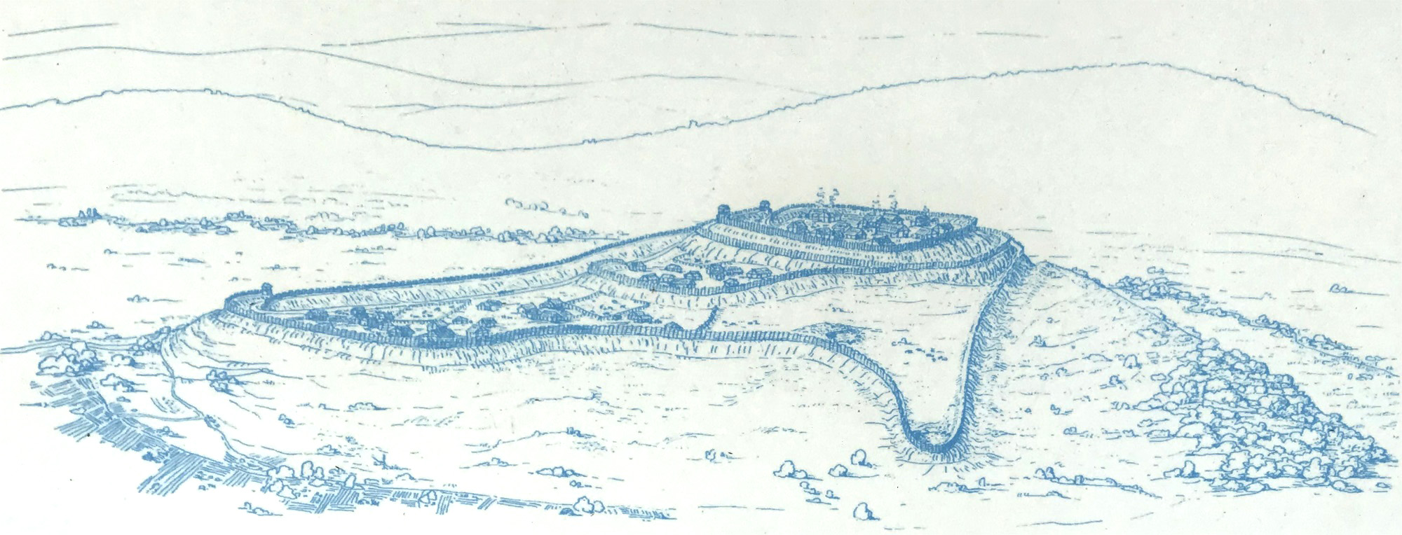 Ipf - Zeichnerischer Rekonstruktionsversuch der Befestigungsanlagen